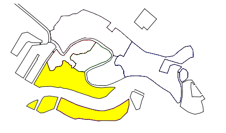 Sestiere di Dorsoduro a Venezia